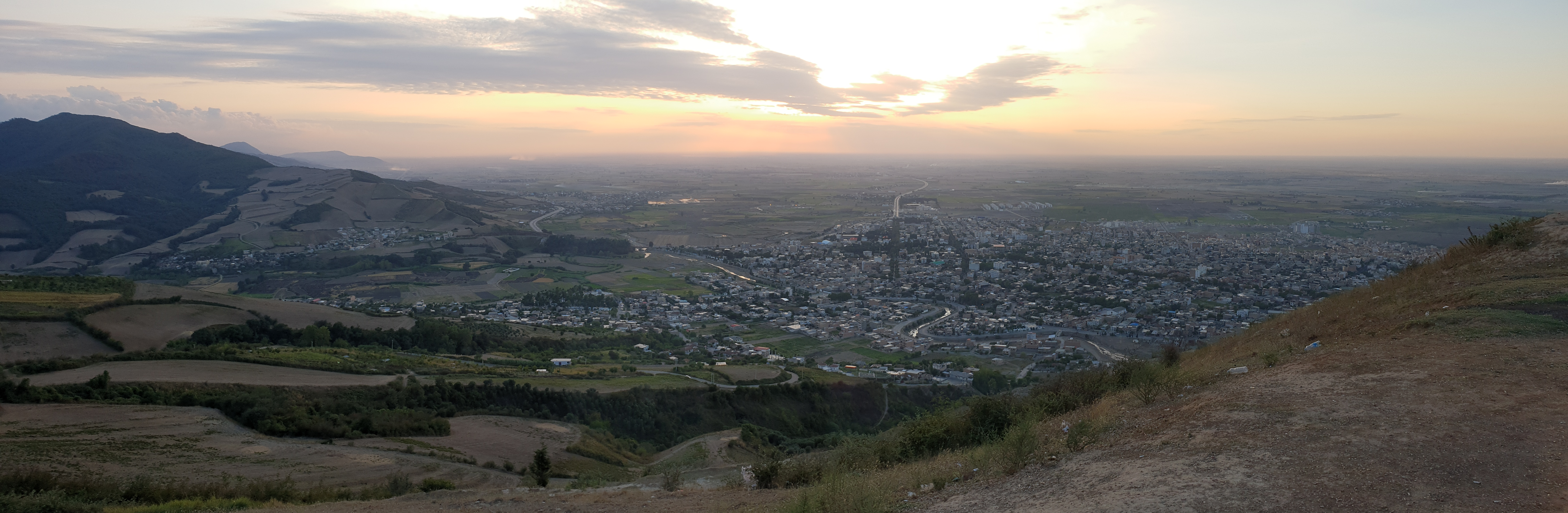 سراسرنمایی از شهر مینودشت